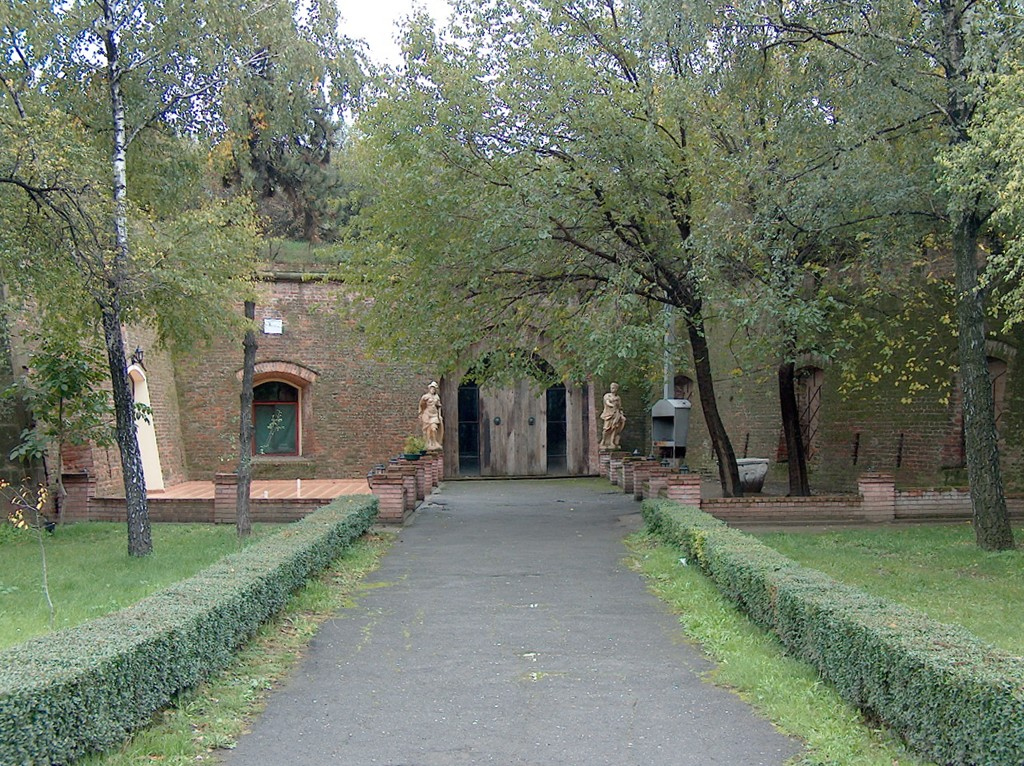 Bastion Timisoara